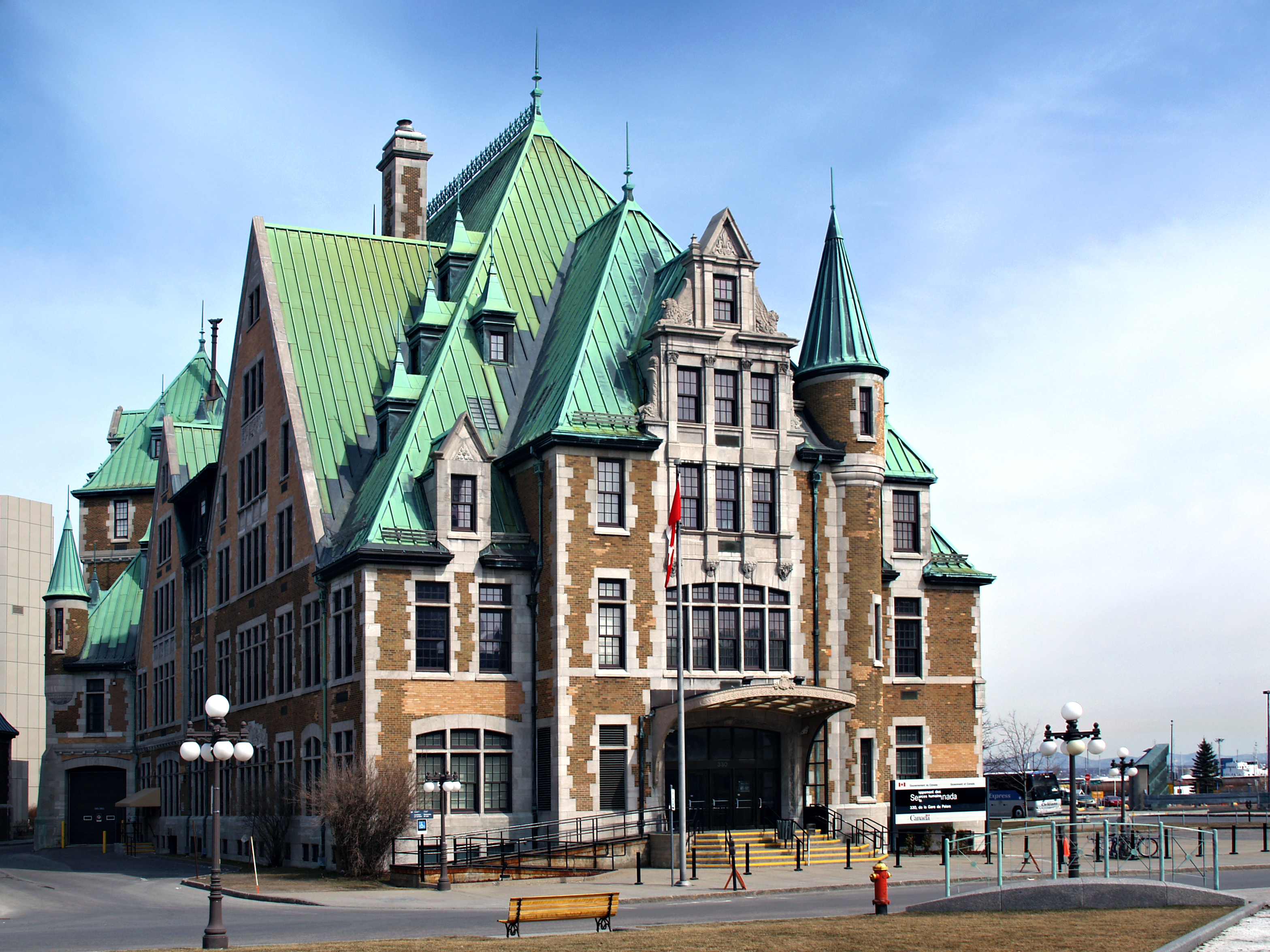 Québec (ville) - Bâtiment de Service Canada, 330 rue de la gare du Palais